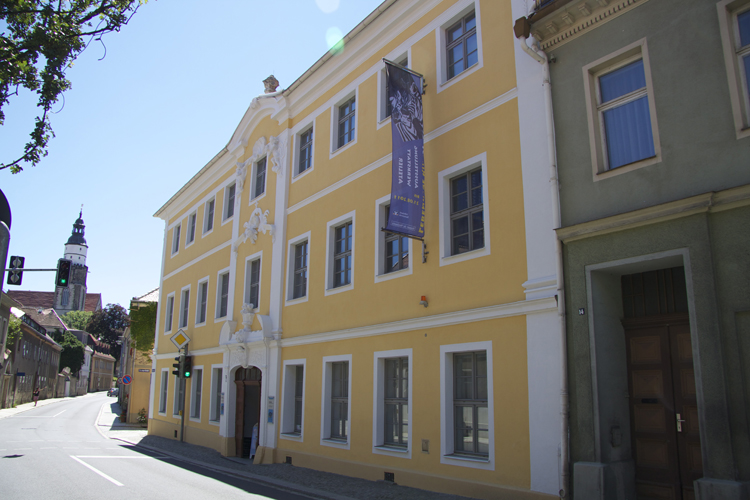 Außenansicht des Elementariums des Museum der Westlausitz in Kamenz